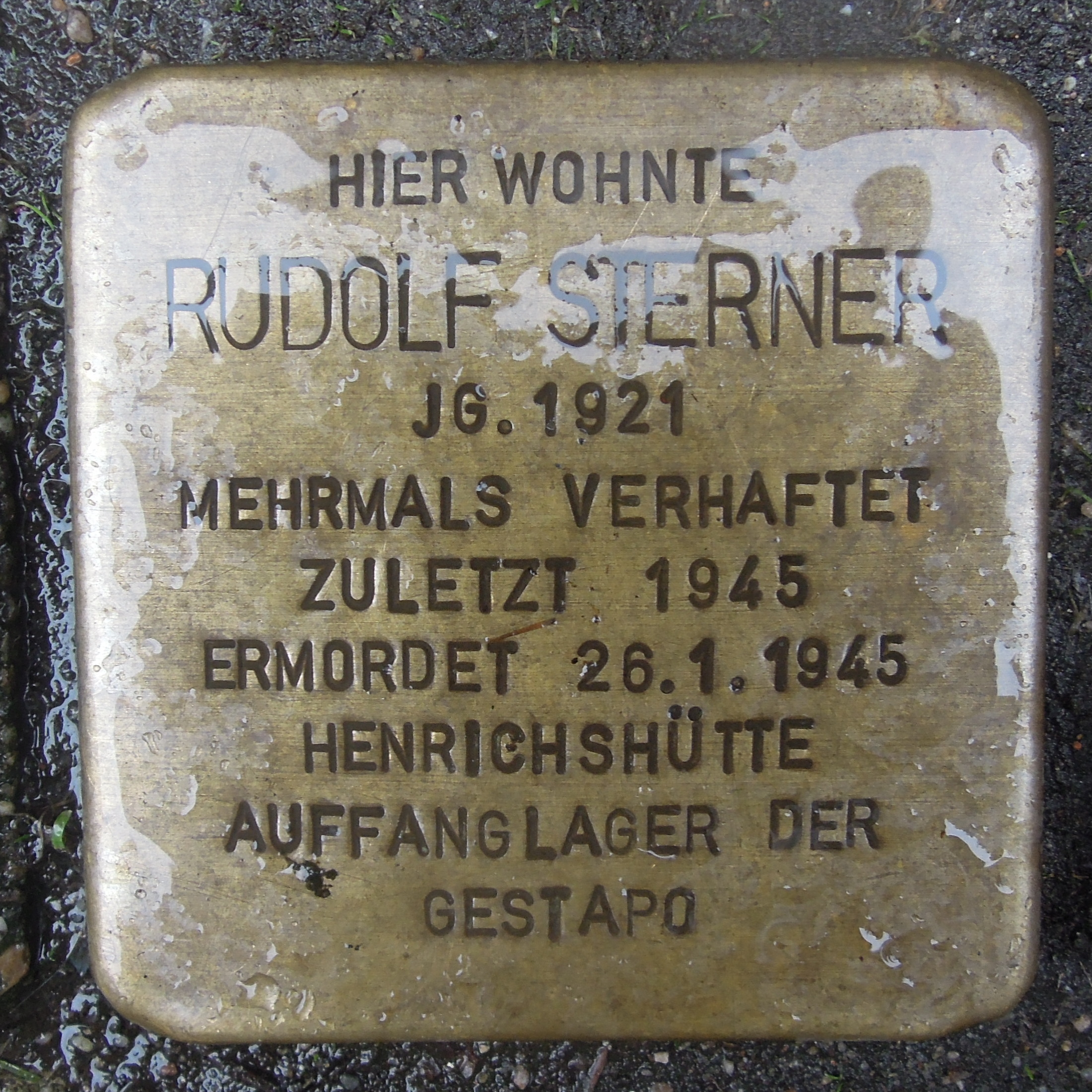 Stolperstein Hattingen Steinhagen 8 für Rudolf Sterner